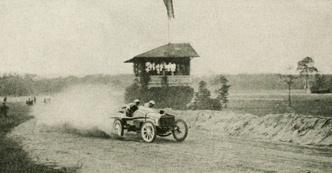 Fritz Opel à l'hippodrome de Francfort (l'Oberforsthaus), sur Opel (1904) - La Vie au Grand Air du 30 juin 1904, p.528 (article Les deux autodromes de Georges Prade (1875-1920)